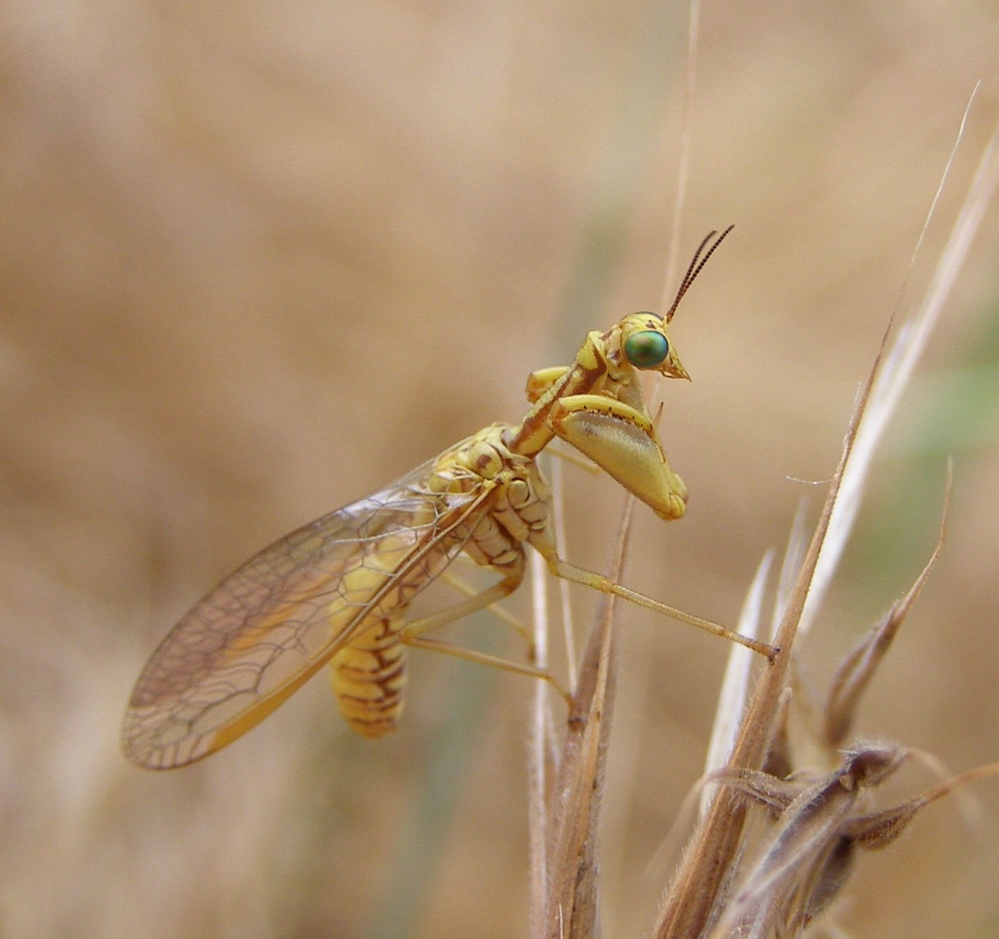 Mantispa aphavexelte, Mantispidae. Au petit matin sur l'herbe sèche.